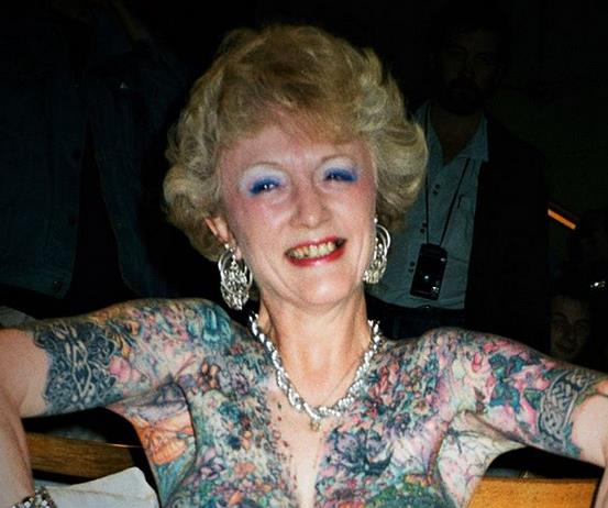 Isobel Varley auf der Tattoo Convention Amsterdam 1990. Auszug aus einem Gesamtbild des völlig unbekleideten Körpers.